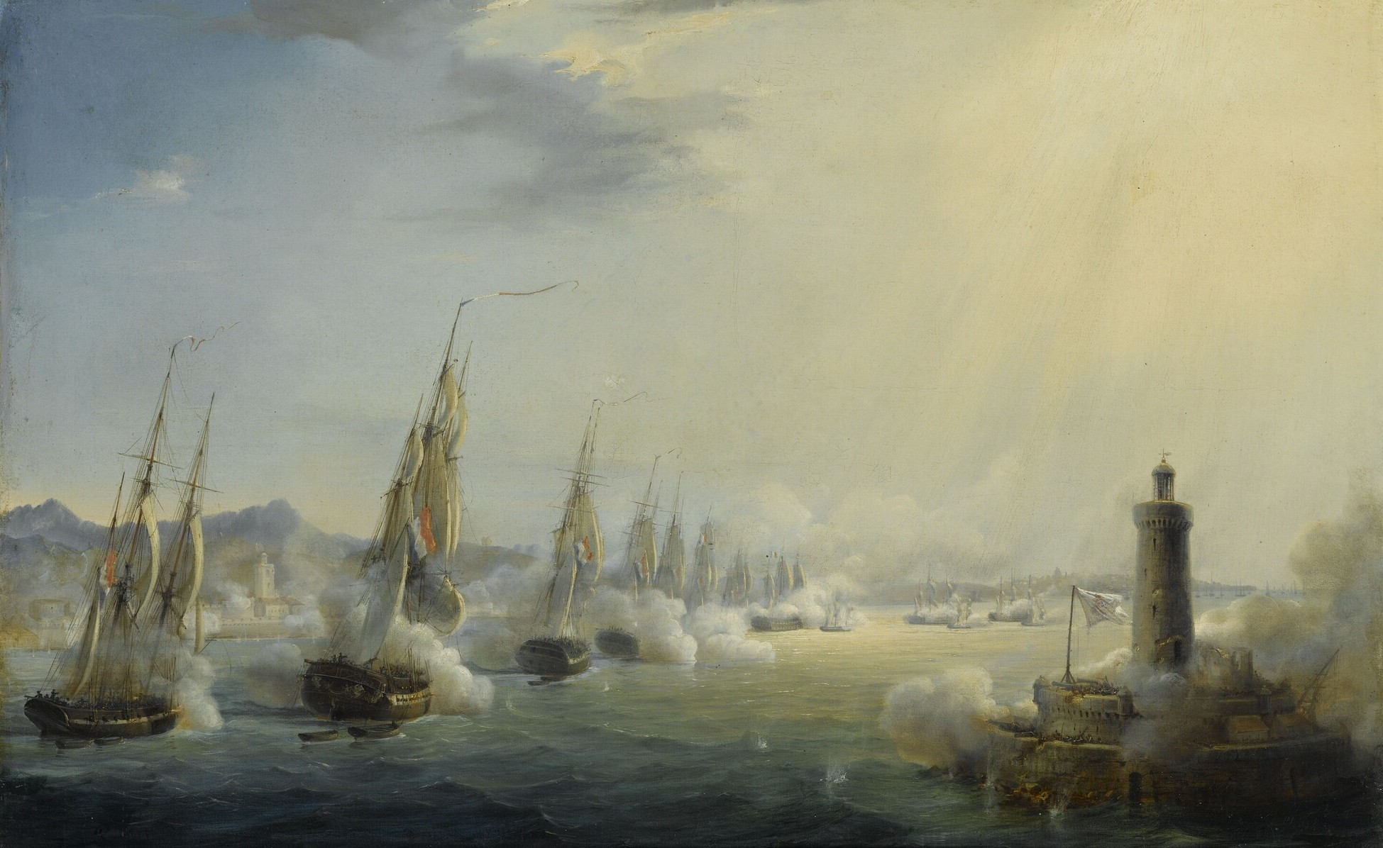 L'escadre française commandée par l'amiral Roussin force l'entrée du Tage, 11 juillet 1831. Dimensions : 53 x 81 cm. Cadre : 71,5 x 101 x 5,9 cm. Matière et technique : huile sur toile.